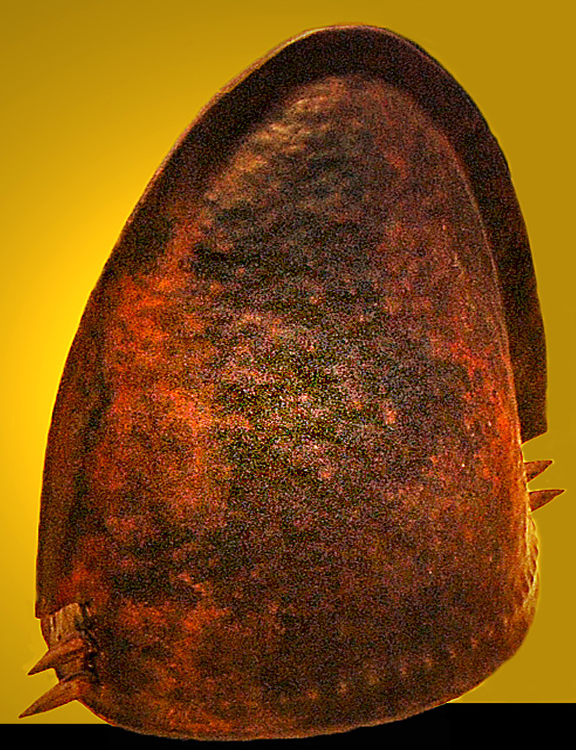 Reconstructie in het Samarapark bij Amiens (Frankrijk) van een bronzen helm uit de bronstijd